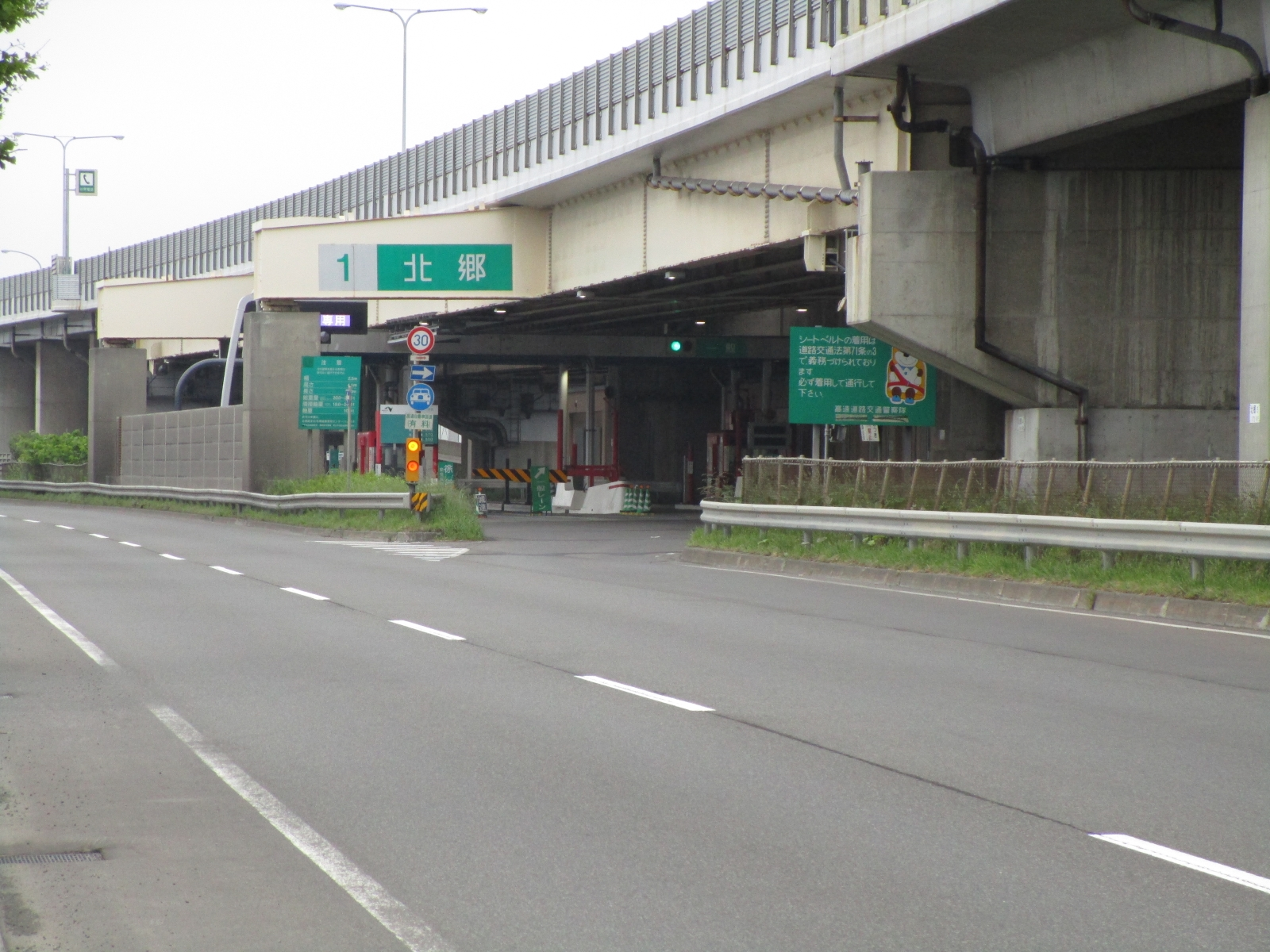 北郷インターチェンジ料金所入口